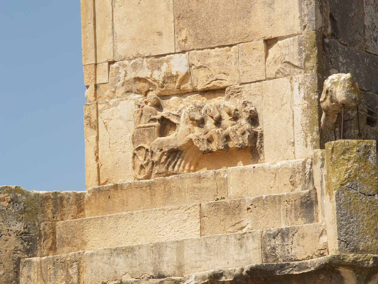 Dougga